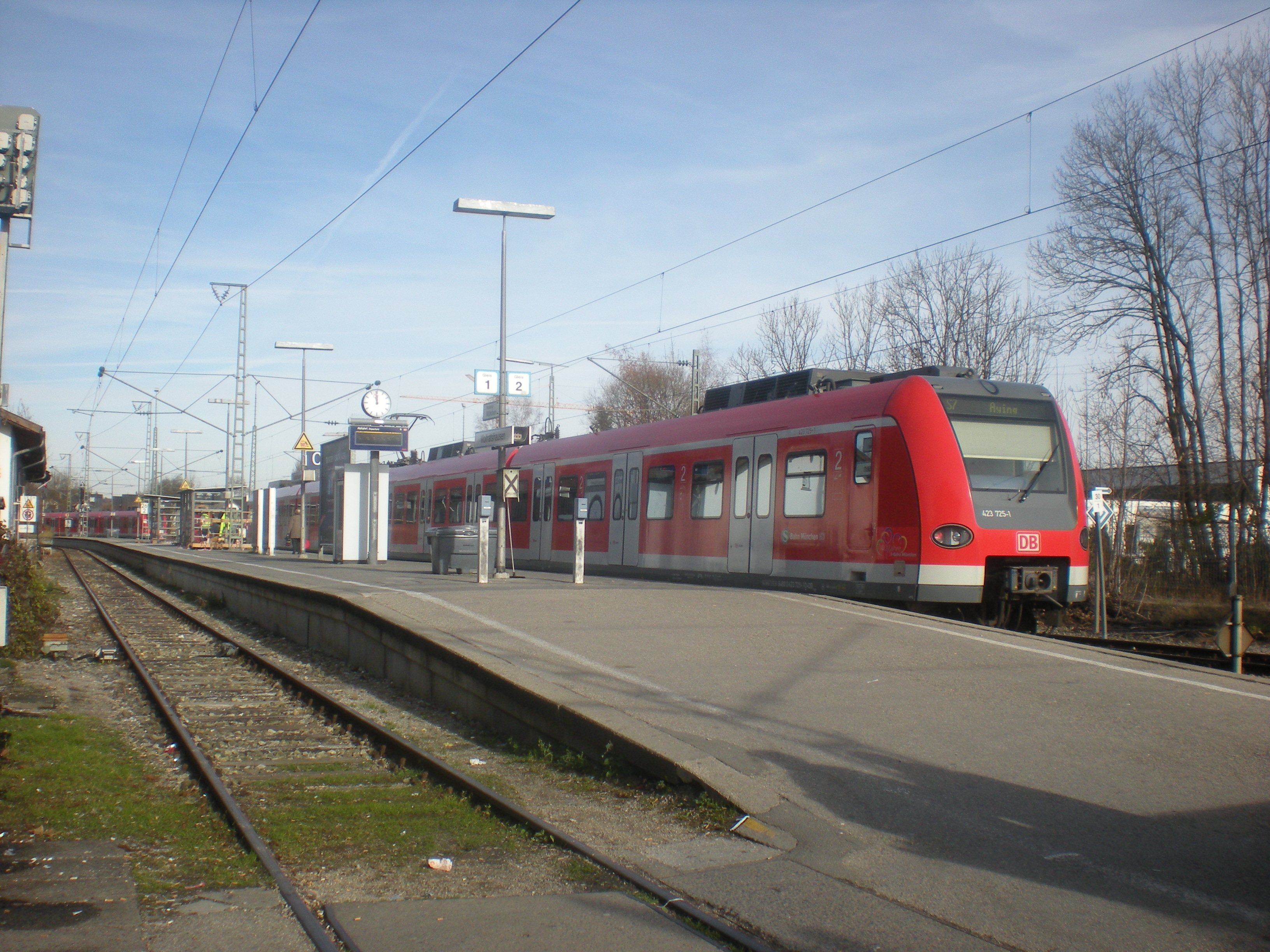 Mittelbahnsteig des Bahnhof Wolfratshausen mit Zug der S7 (Baureihe 423)